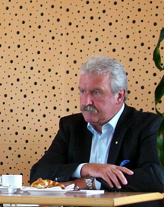 Georg Salvamoser (* 1950 in Garmisch-Partenkirchen; † 21. September 2009 in Freiburg im Breisgau) während der Veranstaltung "Energierevolution - Wege aus der Finanz- Wirtschaftskrise durch regenerative Energien" am 01.07.2009